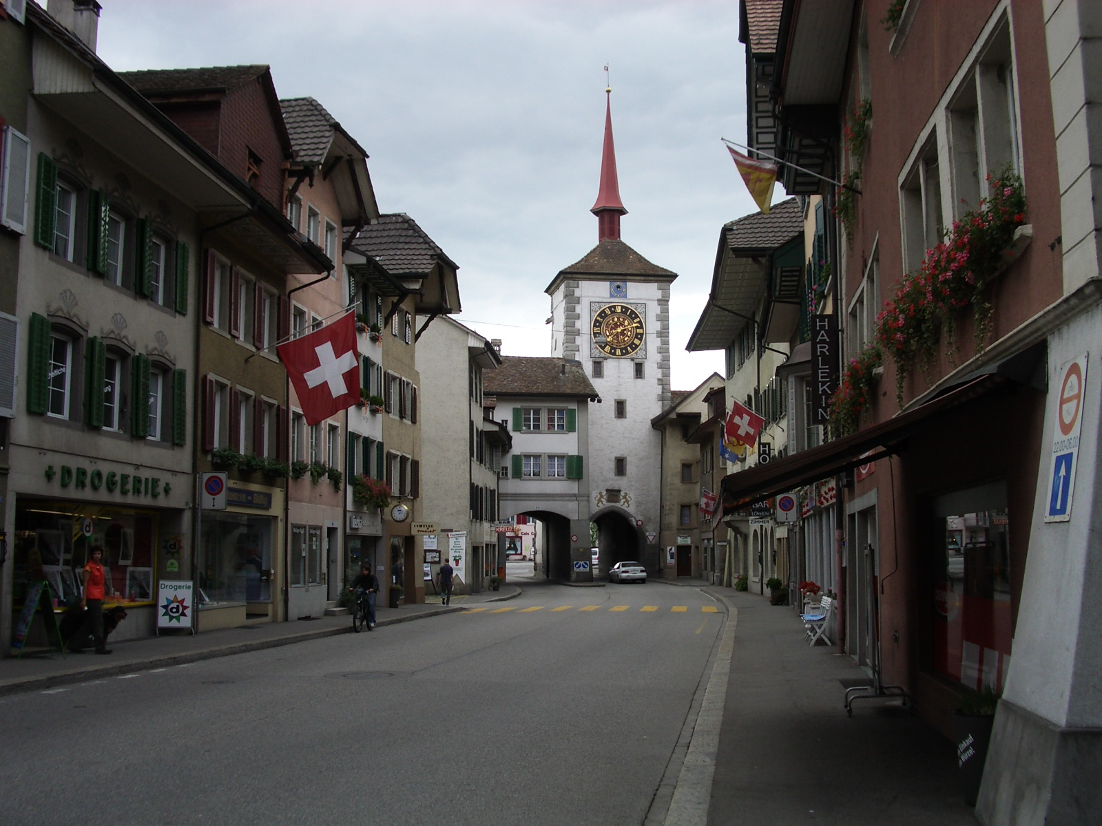 Mellingen AG, Switzerland self-made, August 2006